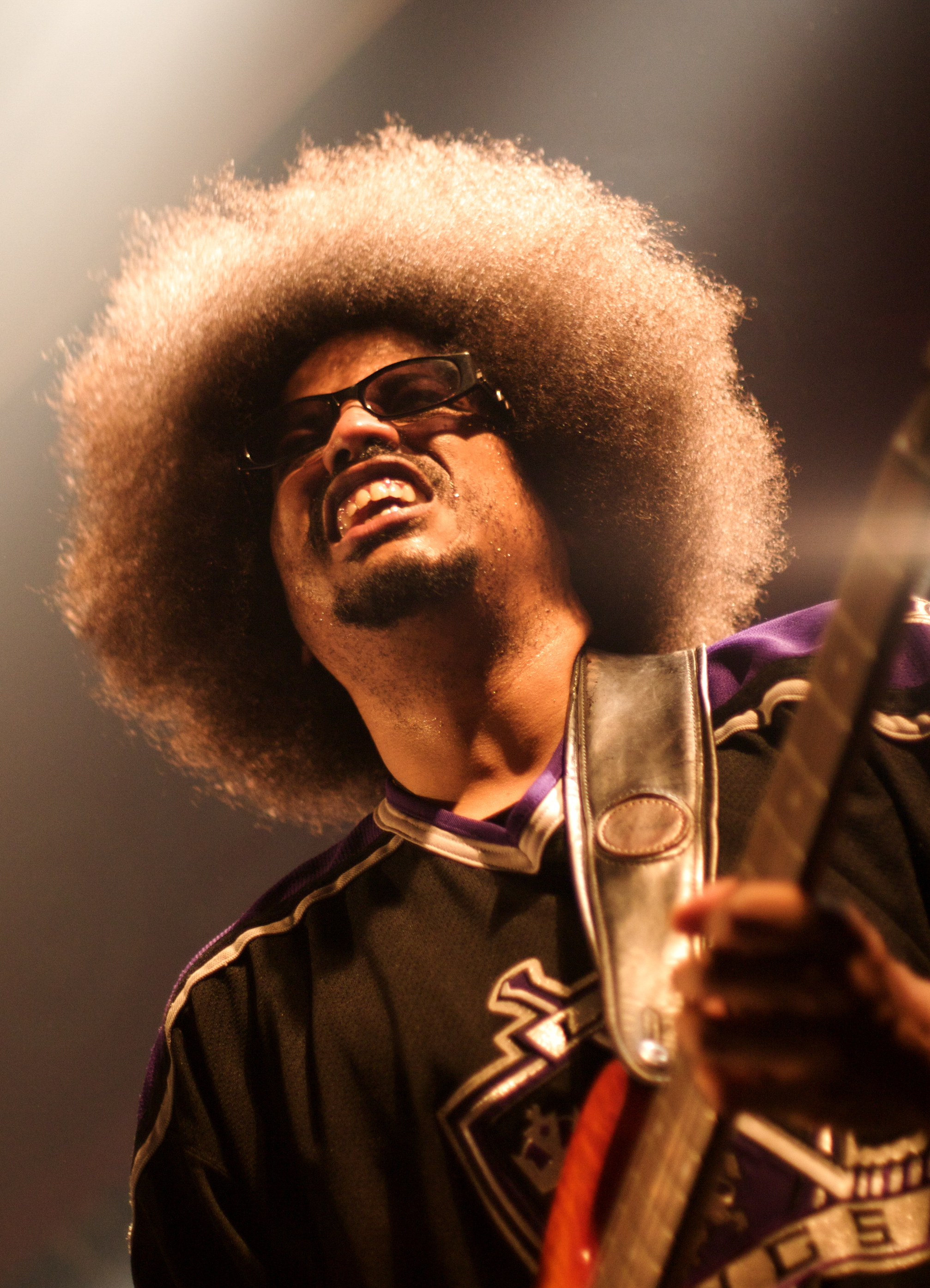 Fishbone en concert à la salle Apolo de Barcelone (Espagne).